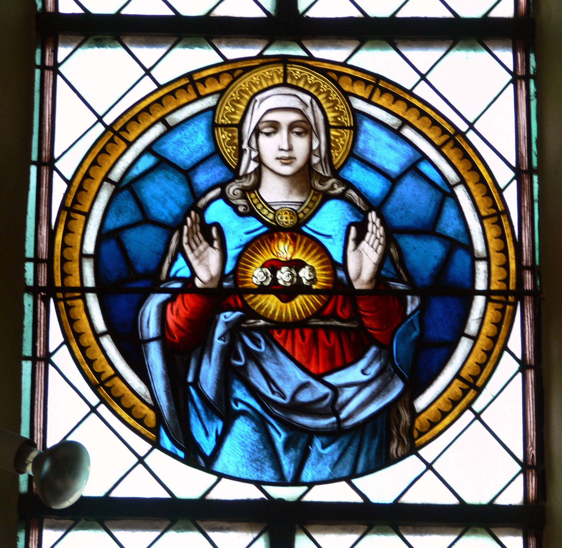 Hepbach (Ortsteil von Markdorf), Bodenseekreis, Baden-Württemberg Pfarrkirche St. Sigismund Fenster